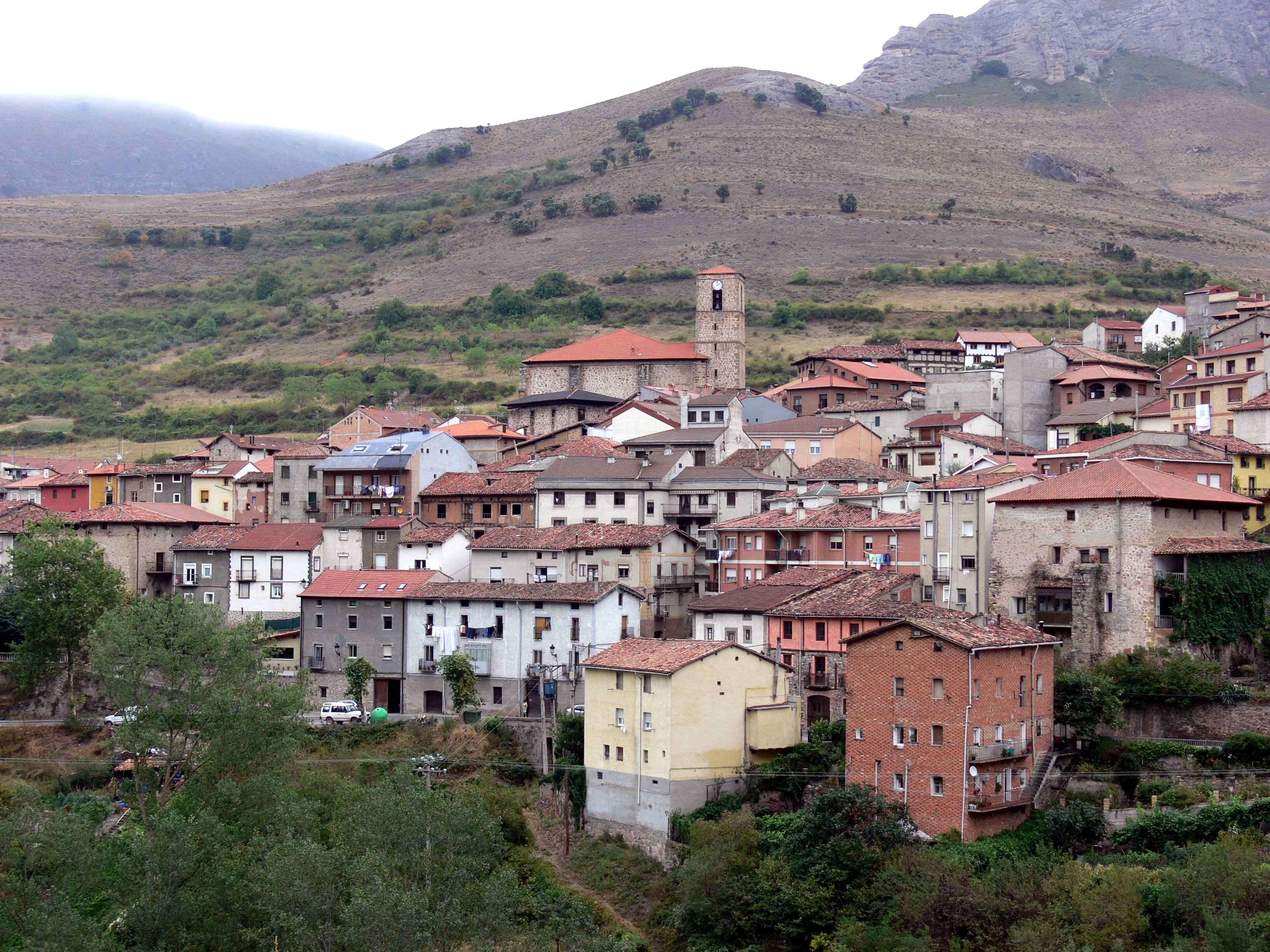 ANGUIANO. Panorámica del Barrio Mediavilla.